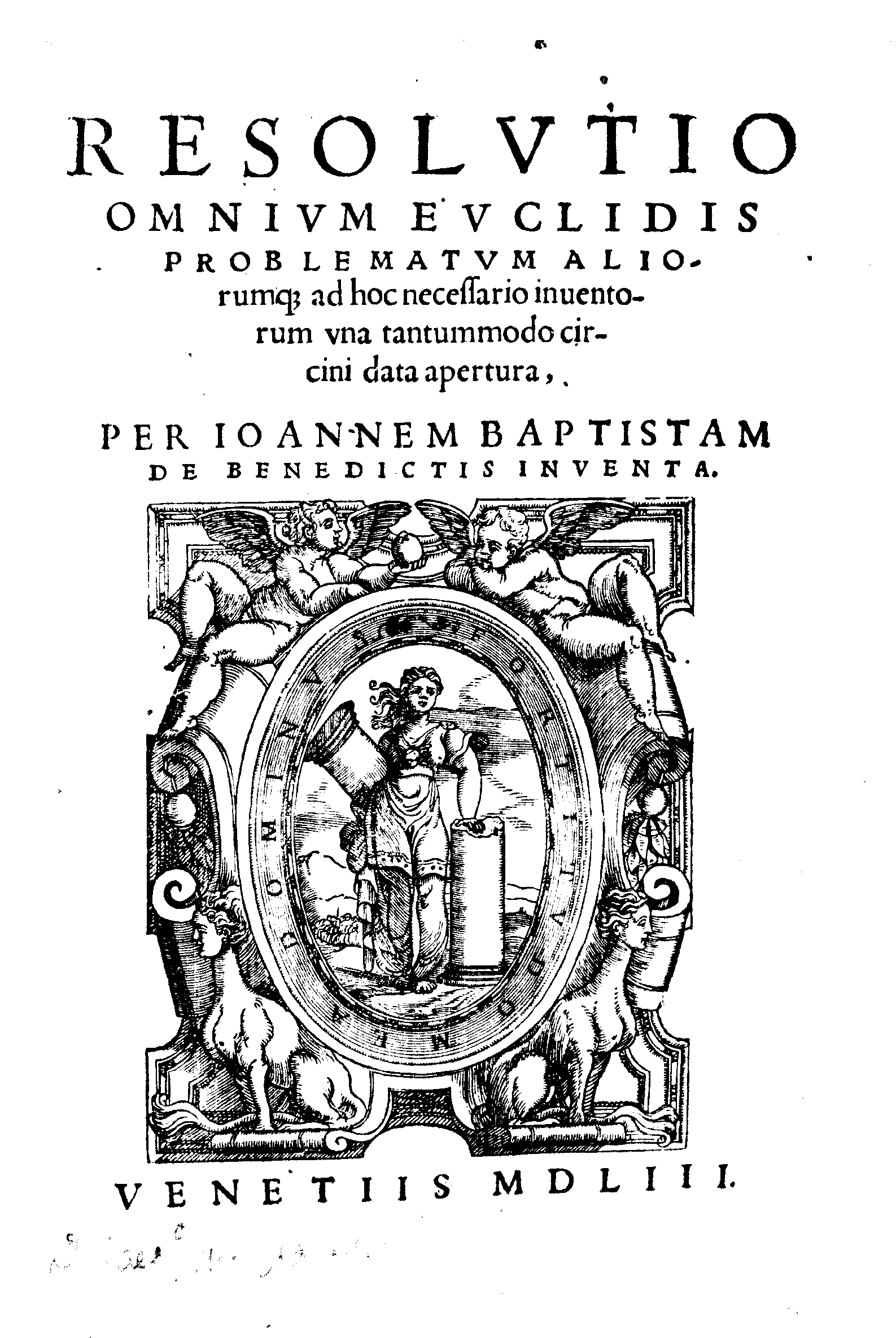 Resolutio omnium Euclidis problematum aliorumque ad hoc necessario inuentorum vna tantummodo circini data apertura, per Ioannem Baptistam de Benedictis inuenta. - Venetiis : [Bartolomeo Cesano], 1553 (Venetiis : apud Bartholomaeum Caesanum, 1553). - [12], 57, [1] c. : ill. ; 4º .